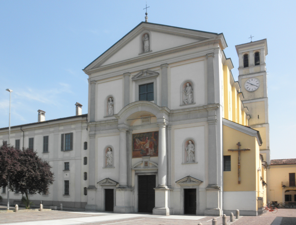 La chiesa parrocchiale di Brembio, dedicata alla Natività della Beata Vergine Maria